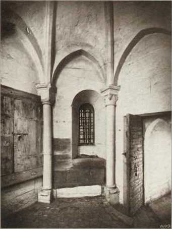 Scan einer Seite aus den Freiburger Münsterblättern 1906.2 über das Hahnenturmarchiv im Freiburger Münster